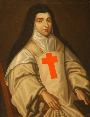 Jacqueline Pascal (1625-1661), poétesse et religieuse janséniste française.